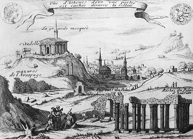 Замальовка Парфенону після прибуття в Афіни Франческо Морозіні